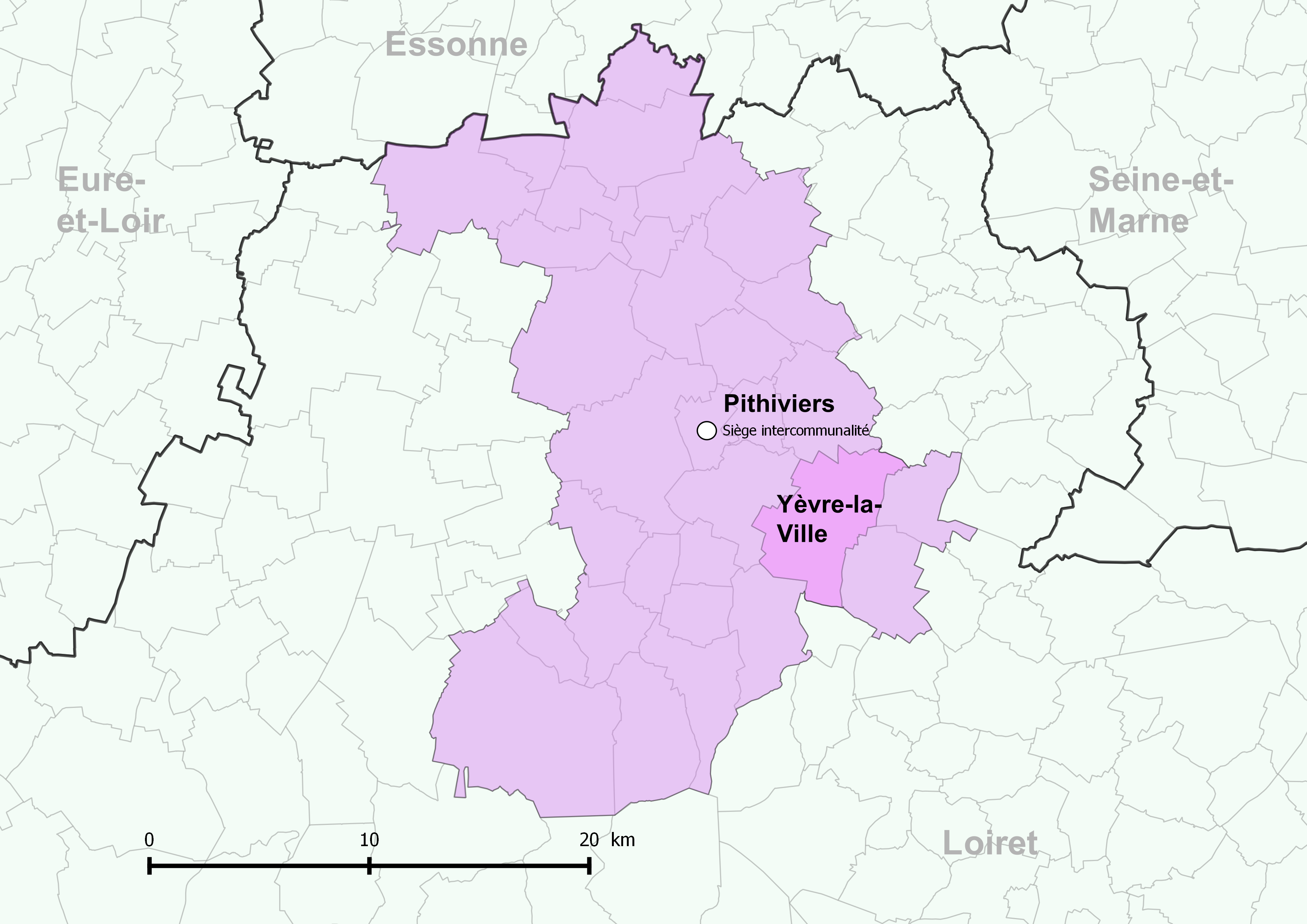 Périmètre de la communauté de communes du Pithiverais - Positionnement de la commune de Yèvre-la-Ville.